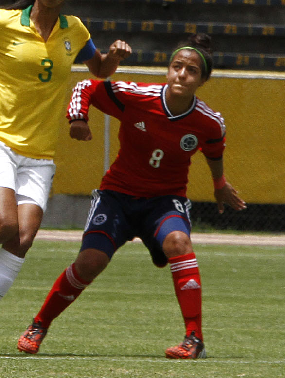 Quito, 28 sep (Andes).- La selección brasileña femenina de fútbol se proclamó Campeona de la Copa América de Fútbol Ecuador 2014. Foto: Micaela Ayala V./Andes